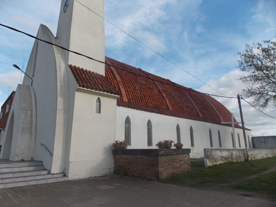 Iglesia San Jacinto vista de costado